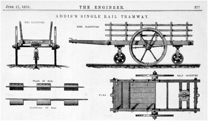 Addis System Monorail Illustration from ‘The Engineer’ 17 Jun 1870, page 377 (‘Graces Guide’ pdf 5) ‘Addis’s Single Line Tramway’